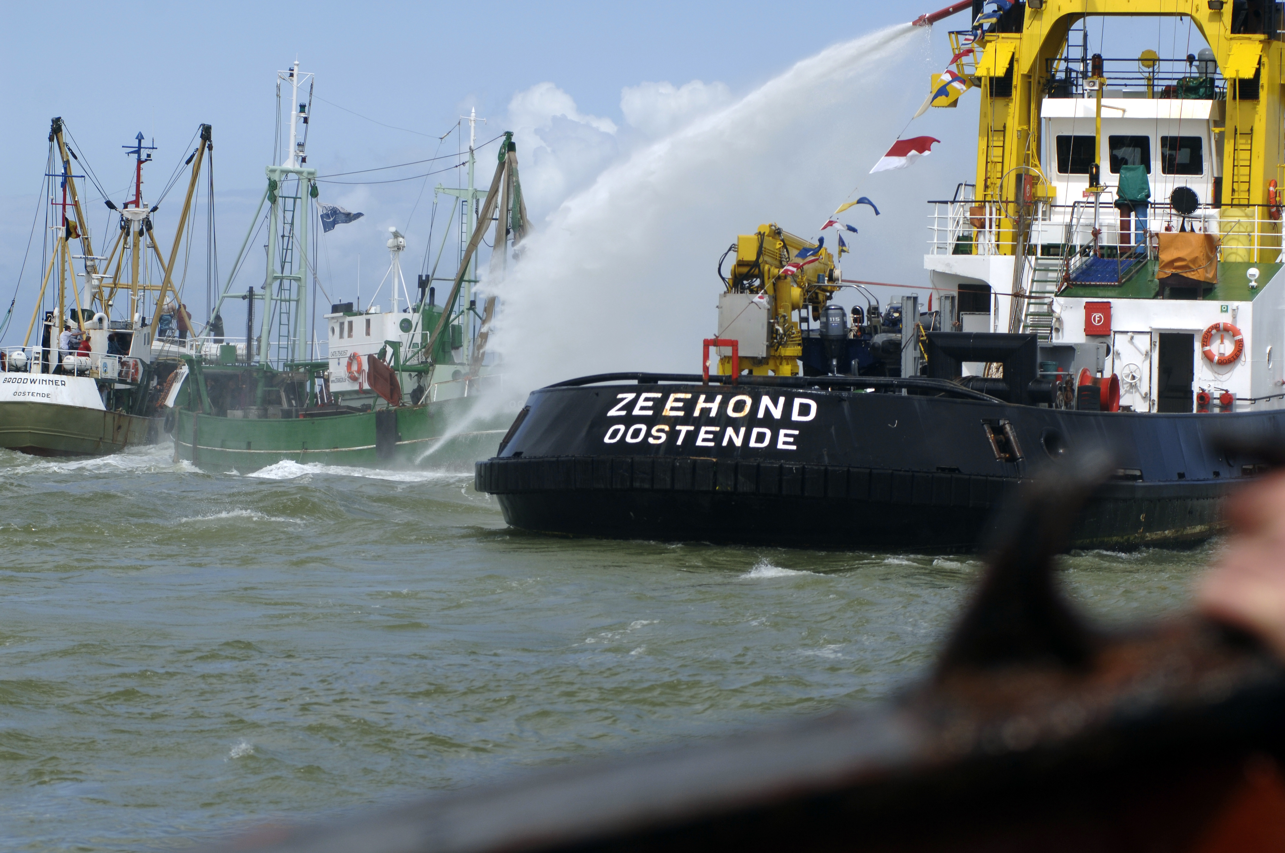 Zeewijding in de haven van Oostende 2012. Het was te slecht weer buiten de haven.